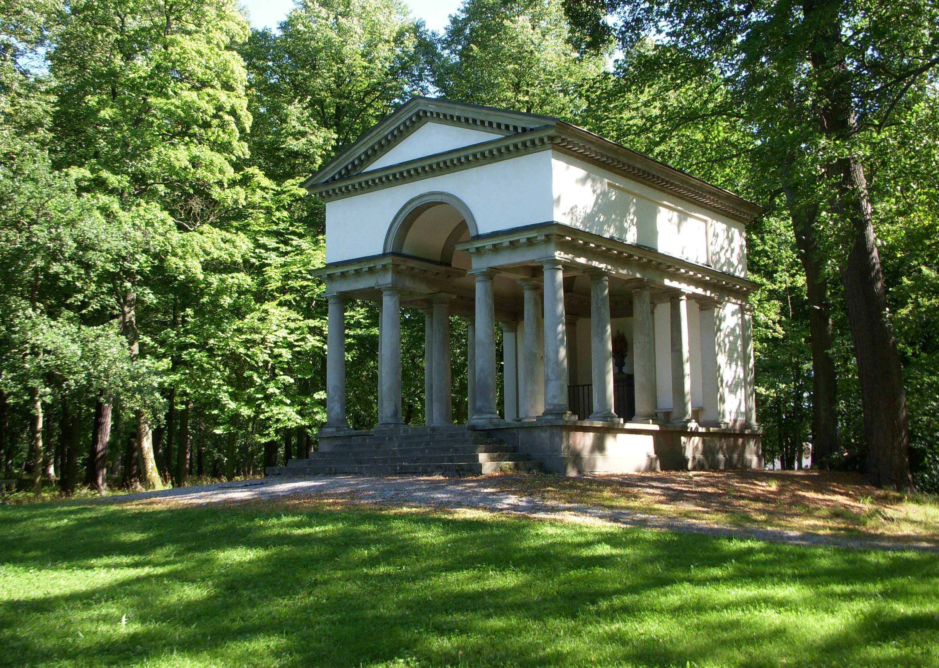 Karlbergs slott, Solna, Dianatempeln